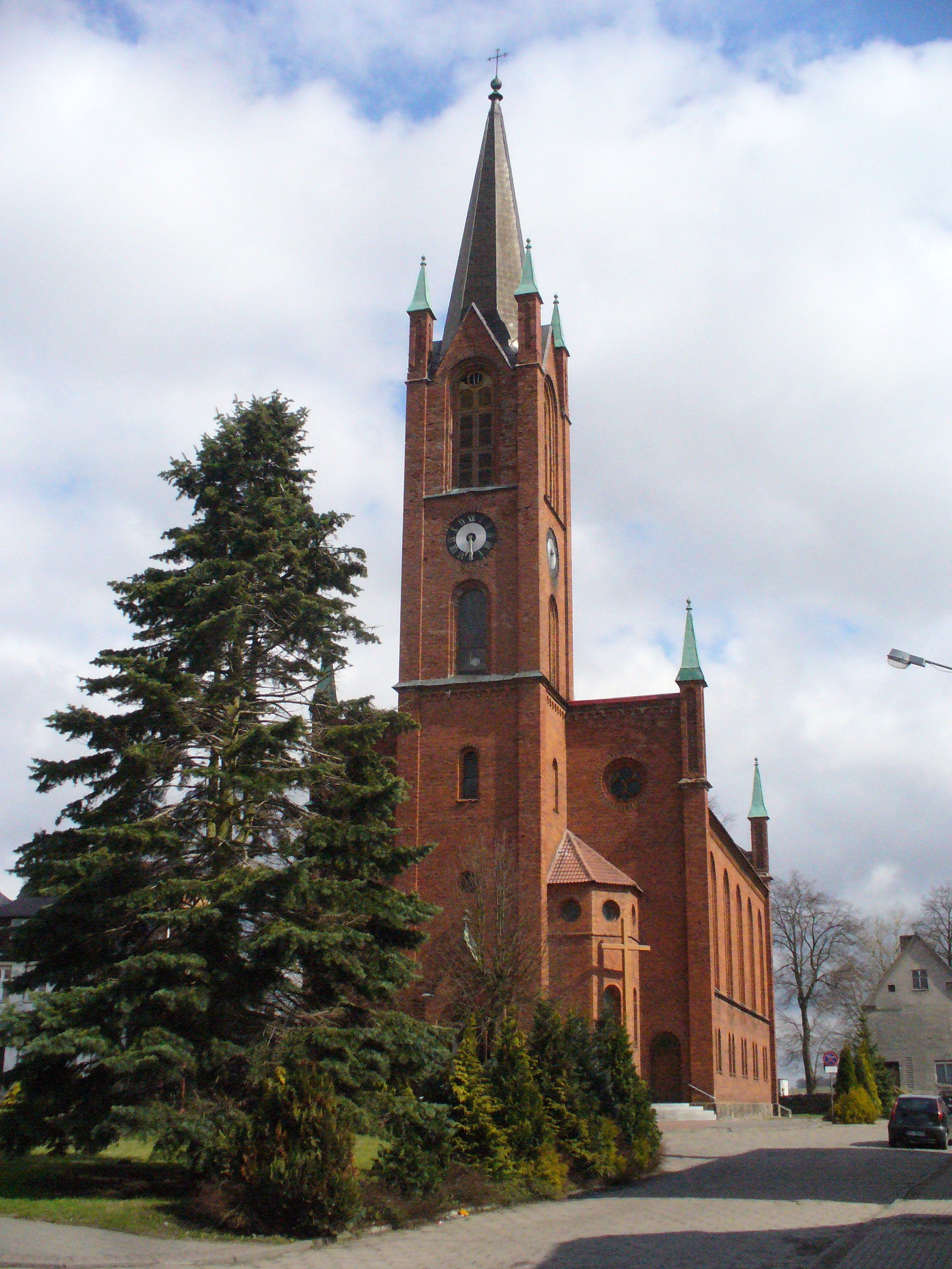 kościół Św. Stefana Węgierskiego Króla